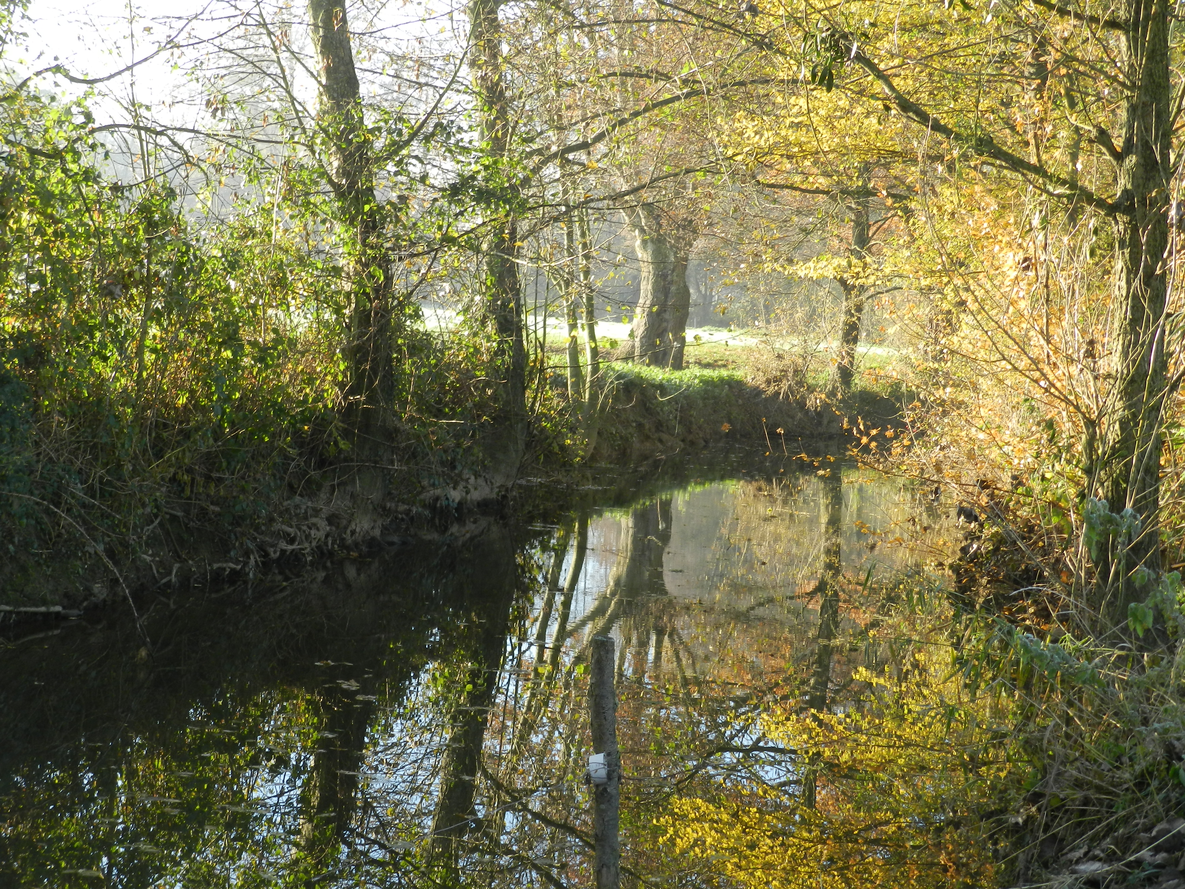 La Vaige au sud de la Bazouge-de-Chemeré le 8 décembre 2013